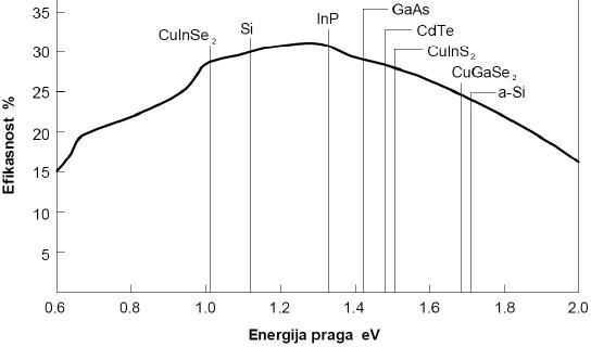 Ovisnost korisnosti fotonaponske sunčane ćelije o energiji praga (energetskoj barijeri)